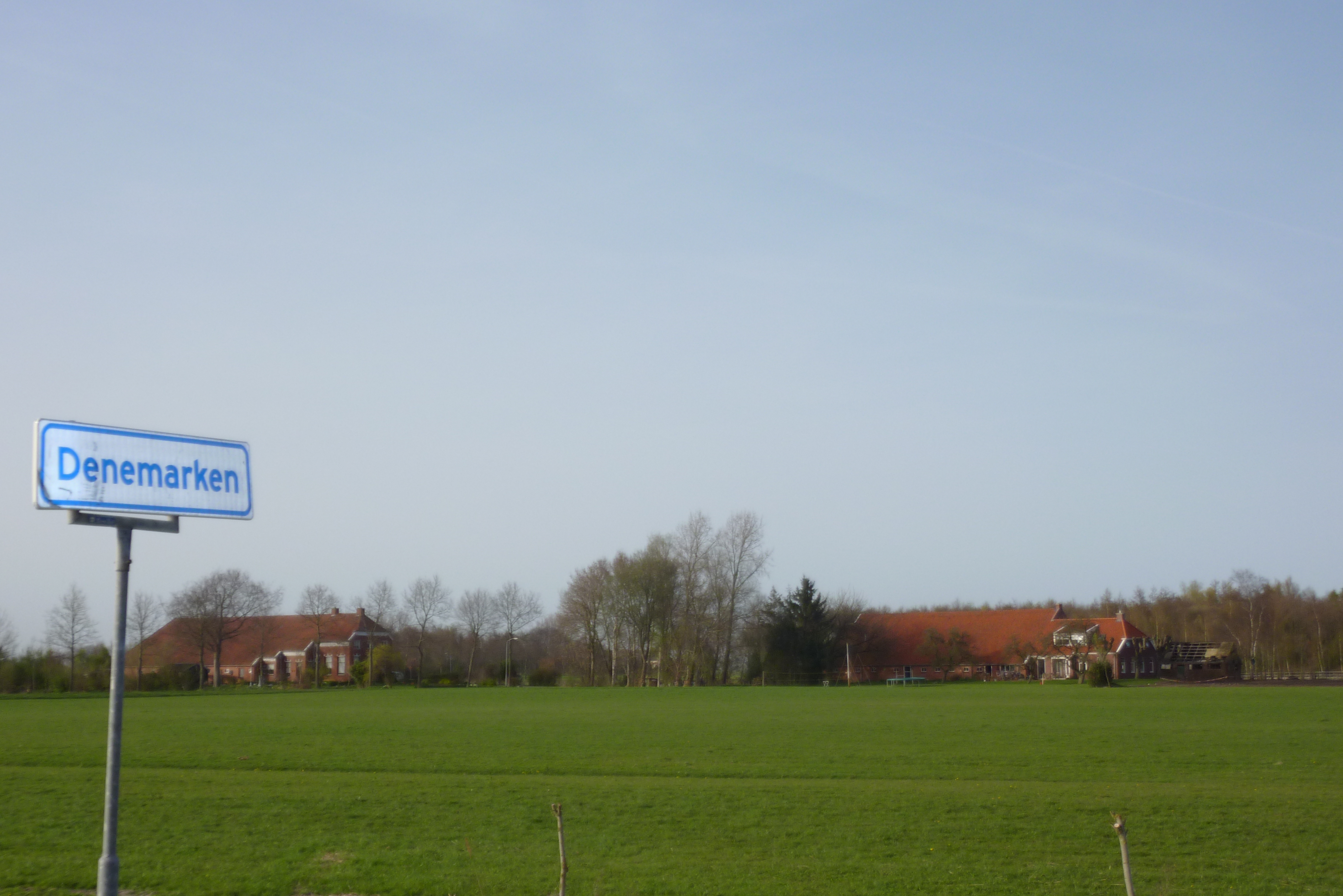 buurtschap Denemarken, gemeente Slochteren